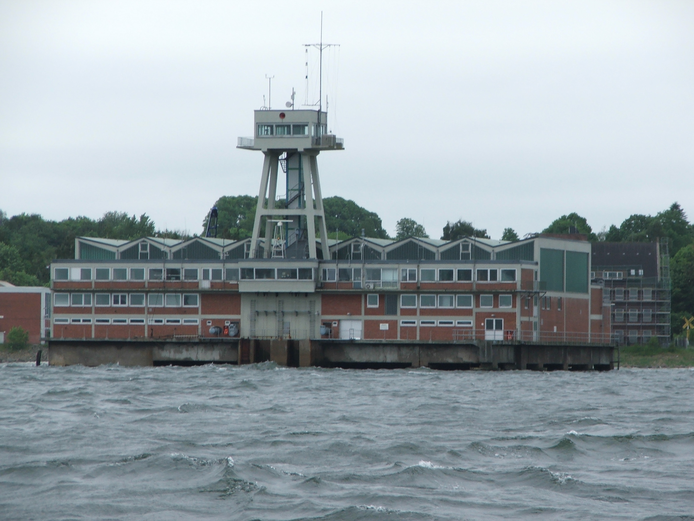 Gebäude der WTD 71, ehemals Torpedoversuchsanstalt Eckernförde